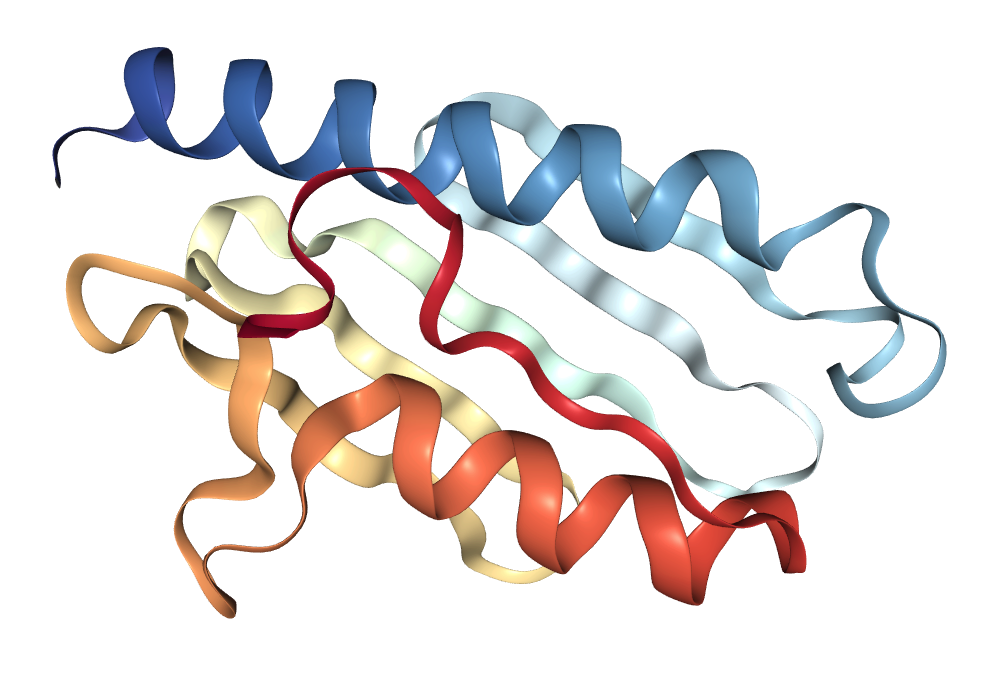 En la imágen pueden observarse las 2 hélices alfa (colores naraja y azul) Así como las 6 láminas beta.